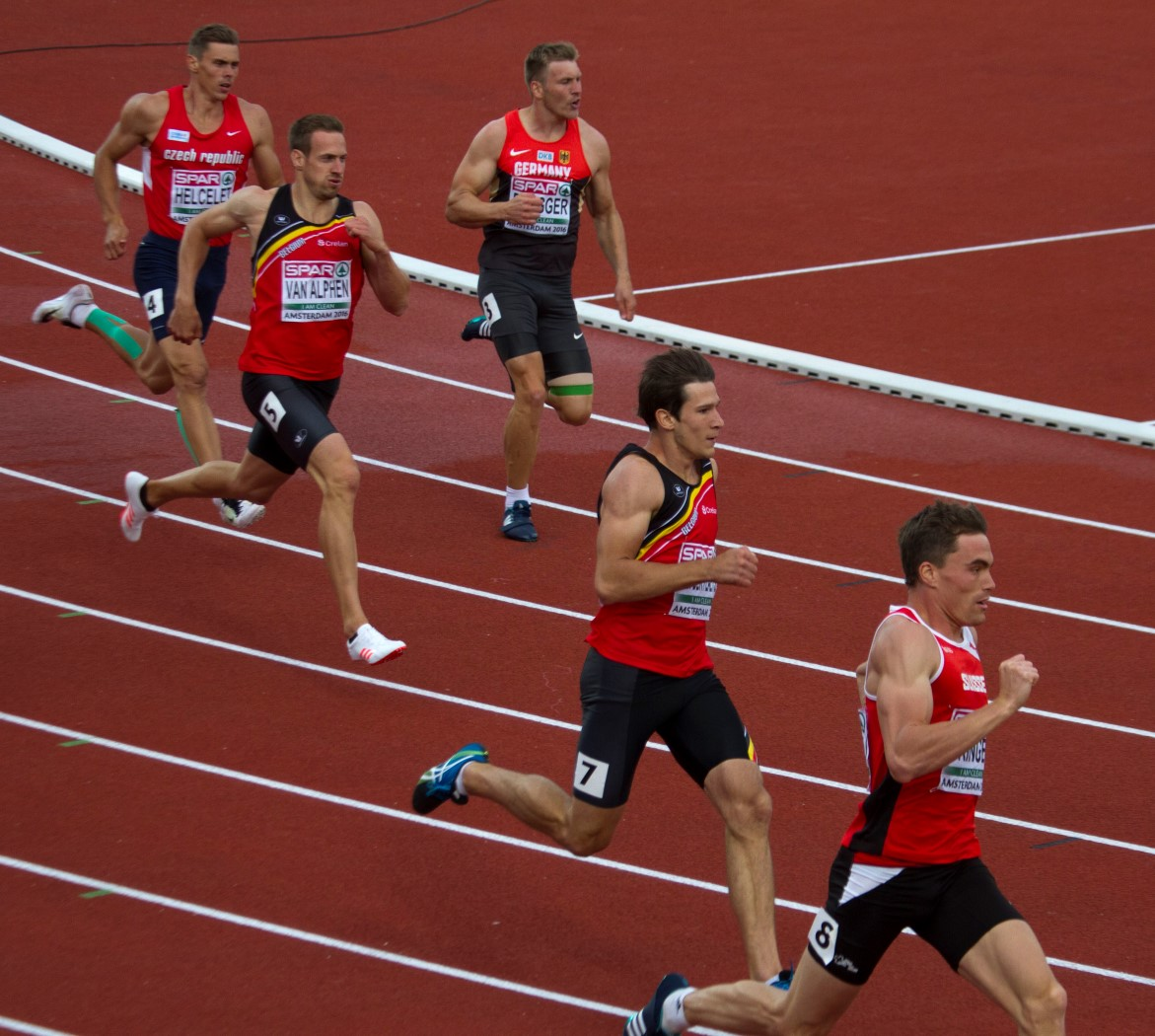 0326 400m tienkamp vdp van alphen